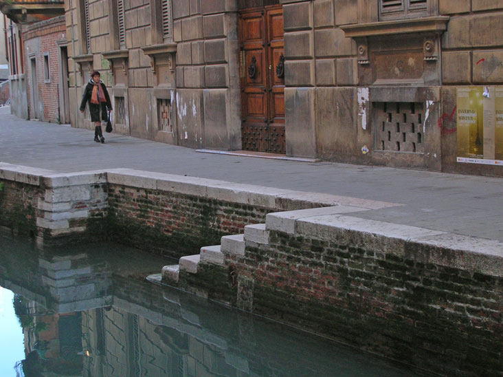 "Riva" parallela ad un canale a Venezia.